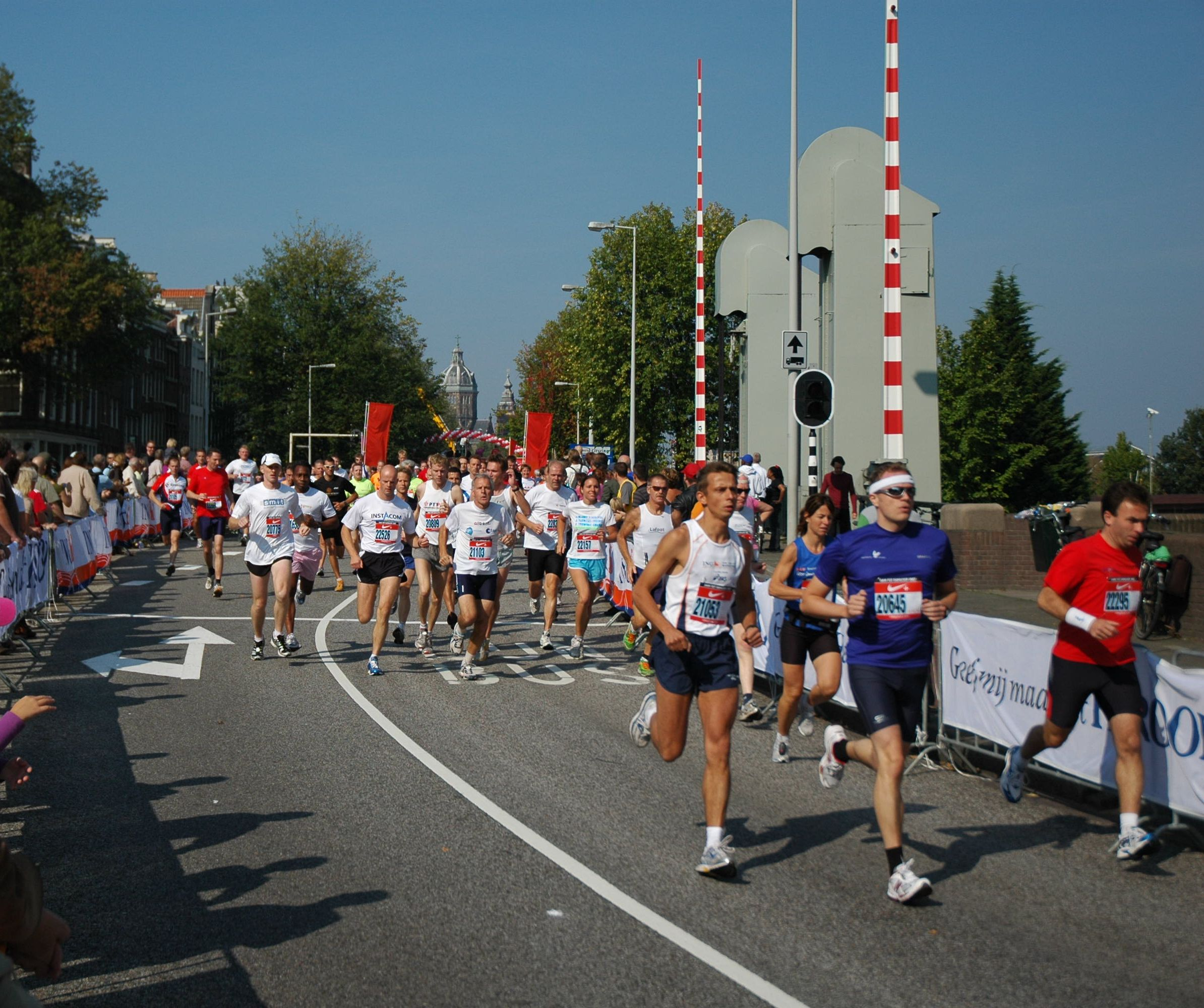 Netherlands, Amsterdam - Dam-tot-Damloop runners after start.